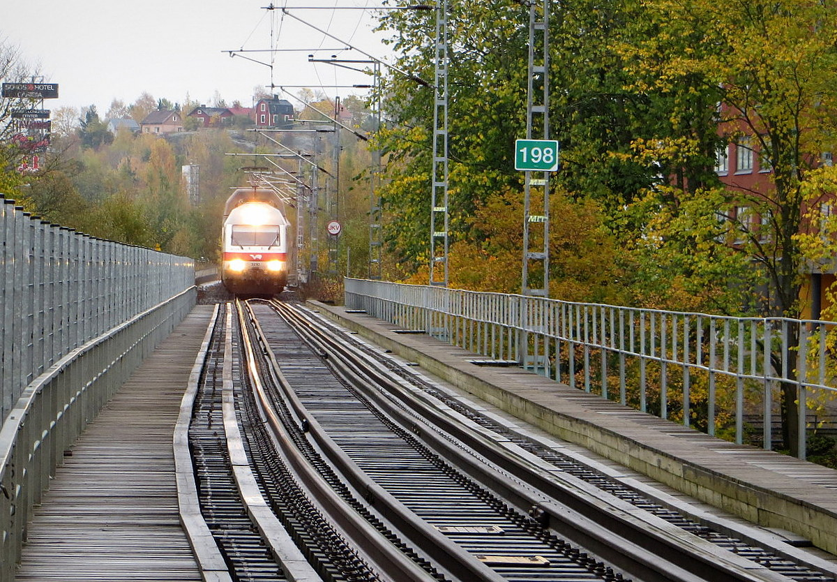 InterCity-juna Helsingistä tulossa Aurajoen sillalle lokakuussa 2012.